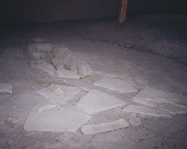 Локалитет Лепенски Вир - остаци куће, заштићеног старом конструкцијом.